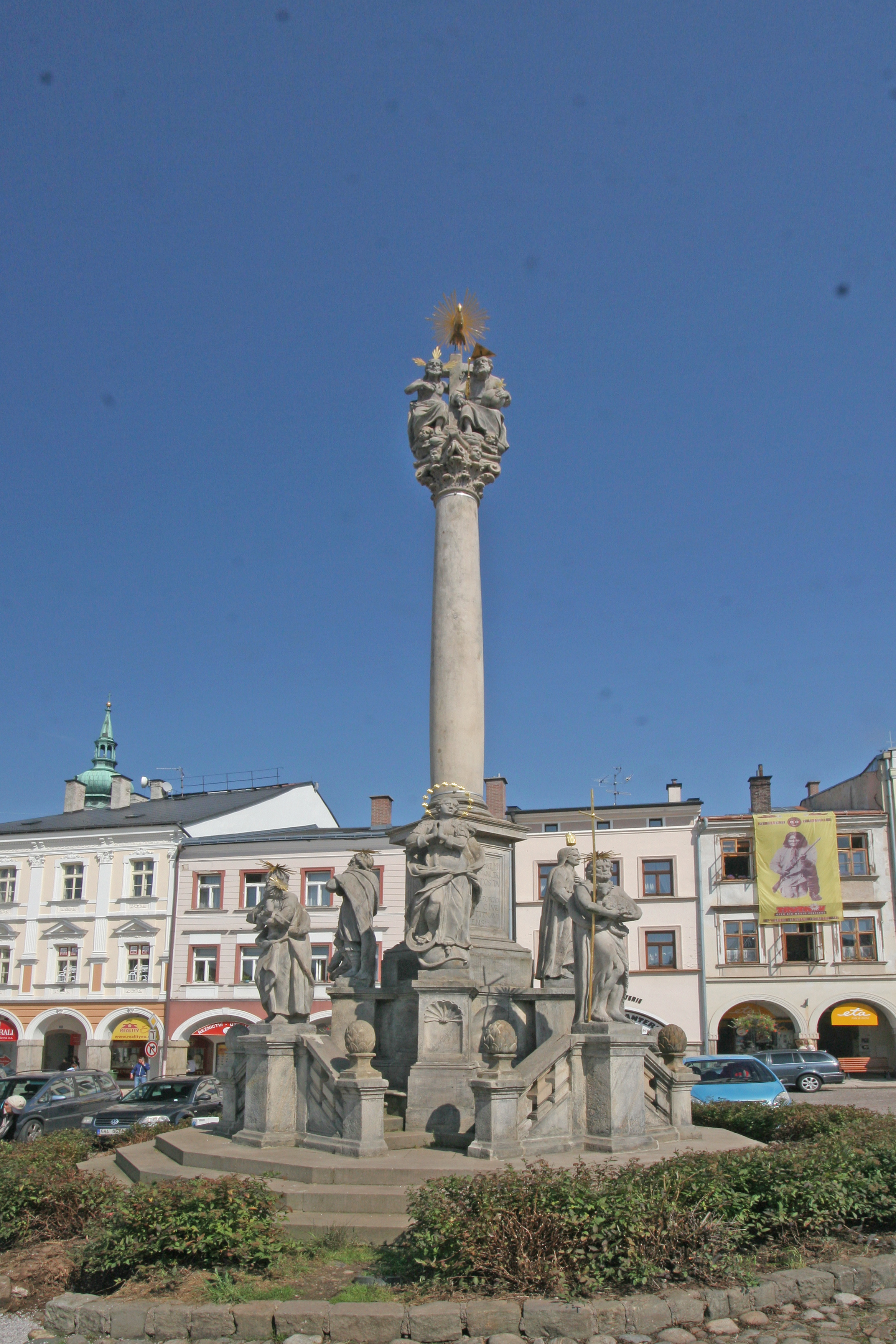 Sloup se sousoším Nejsvětější Trojice, Krakonošovo náměstí, Vnitřní Město, Trutnov.